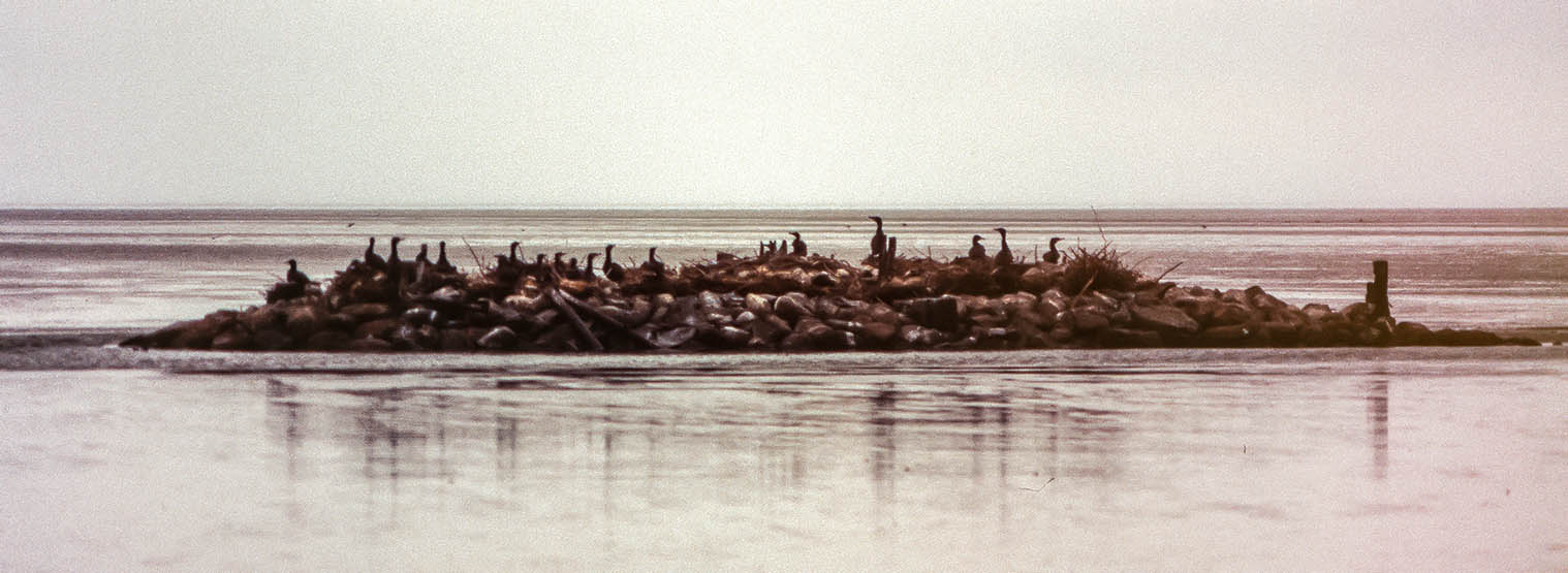 Reste des Fundaments der letzten Scharhönbake. Jetzt Brutplatz von Kormoranen.